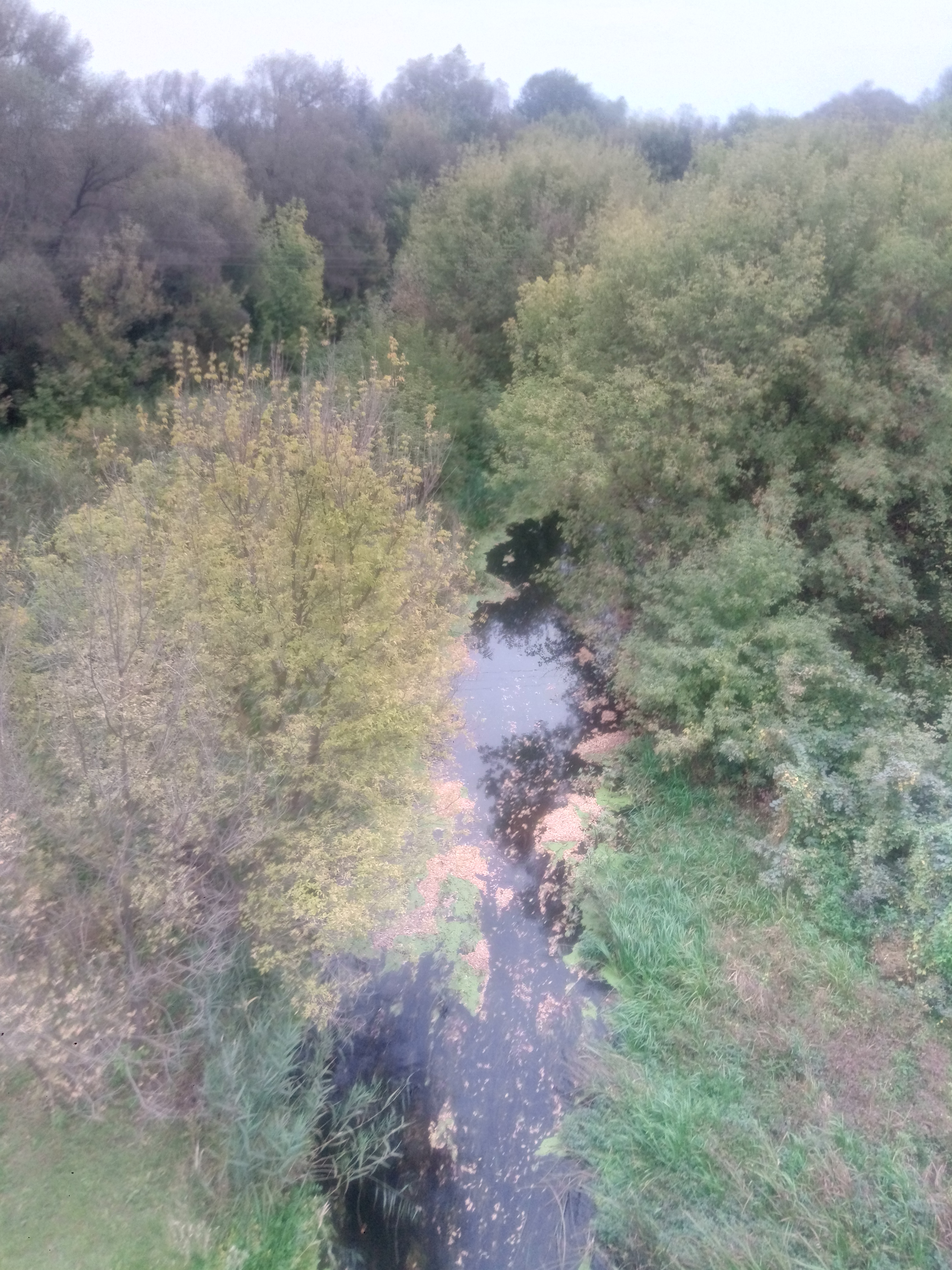 Осередь